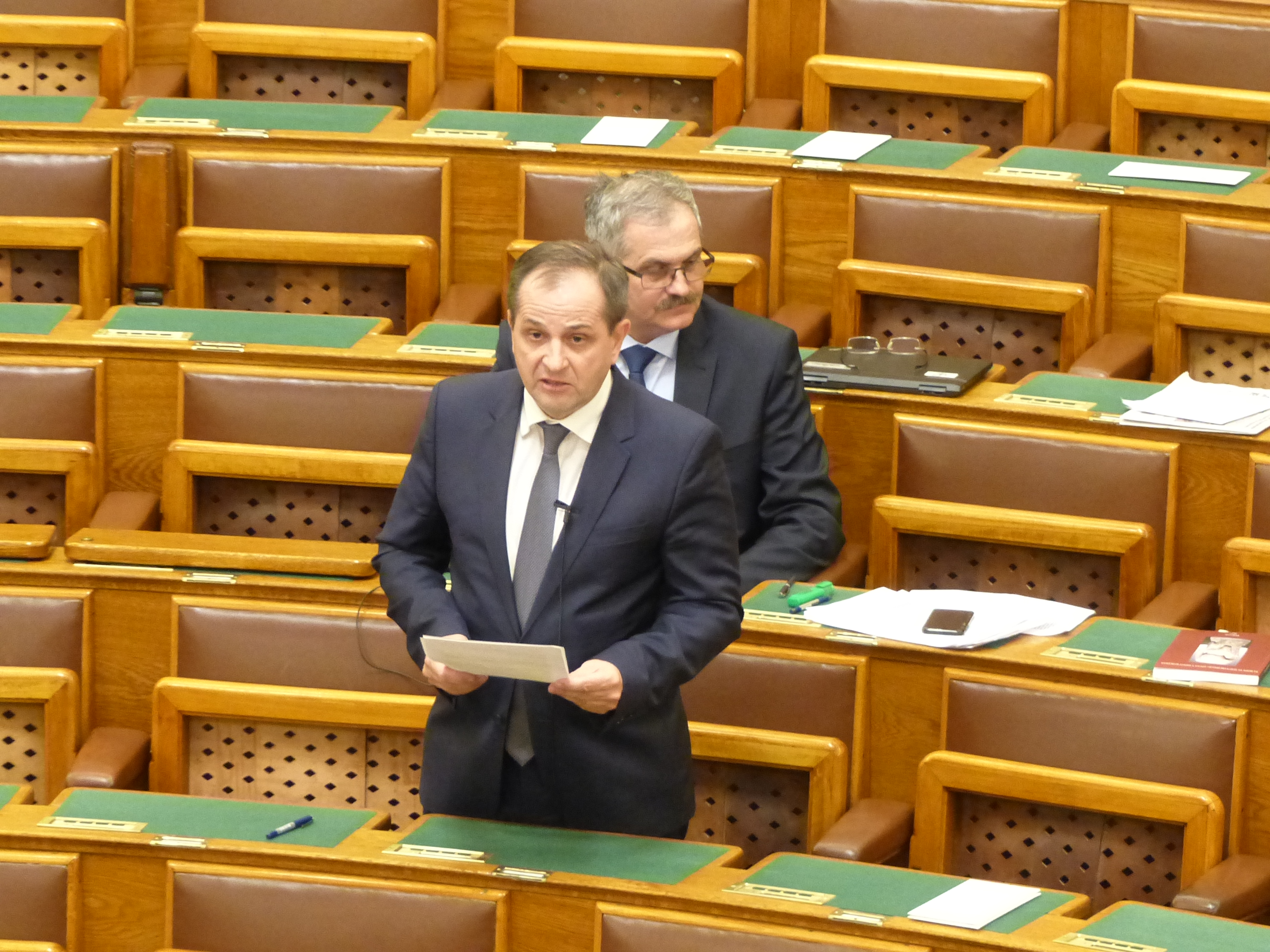 Budai Gyula. Képviselőház, Kossuth tér, Budapest. Időbélyegzővel egyező időben.